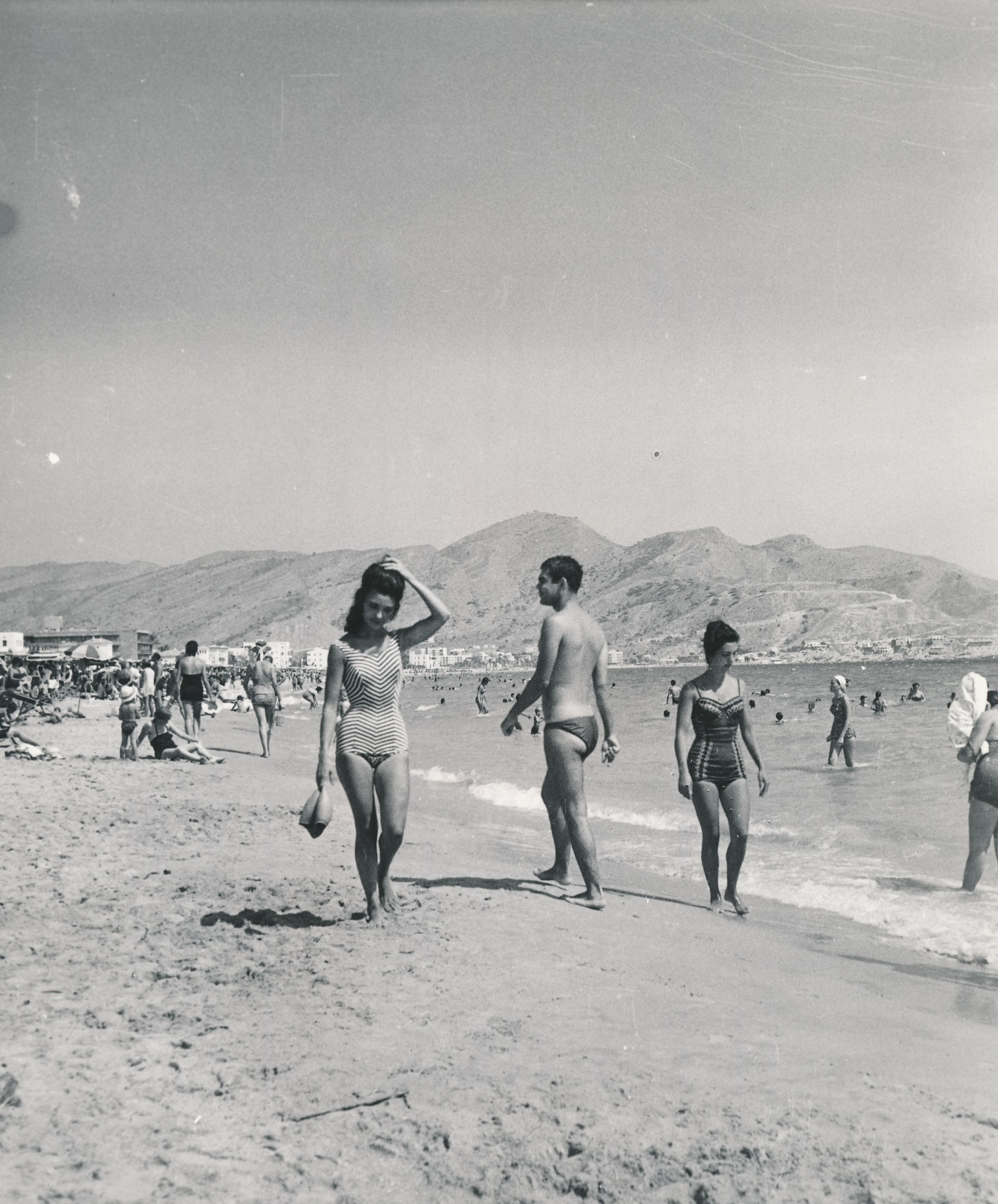 Benidorm (Alicante), 1960 Procedencia: Desconocido Fotógrafo: E. de la Vega Registro nº: 00714 Signatura: Caja 8 Fondos: Biblioteca de la Facultad de Empresa y Gestión Pública (Universidad de Zaragoza) Legado: Luis Fernández Fuster / E.S. Turismo Huesca